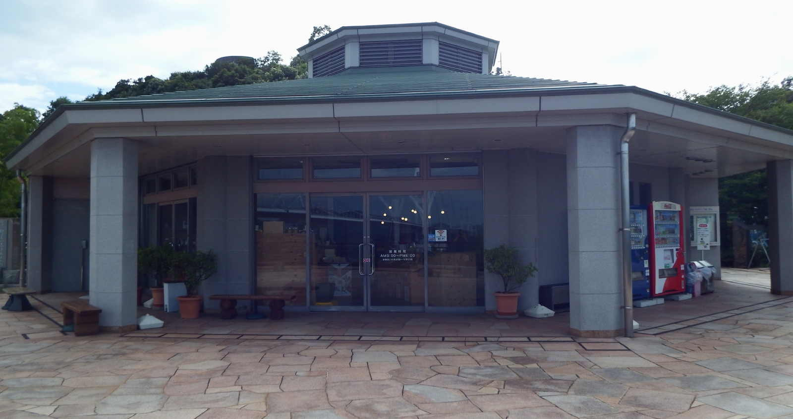 来島海峡展望館